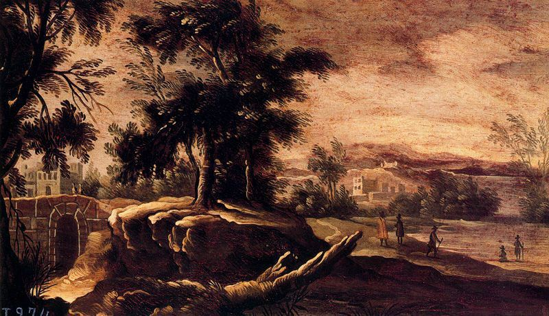 Paisaje, óleo sobre lienzo, 27 x 44 cm, Madrid, Museo del Prado